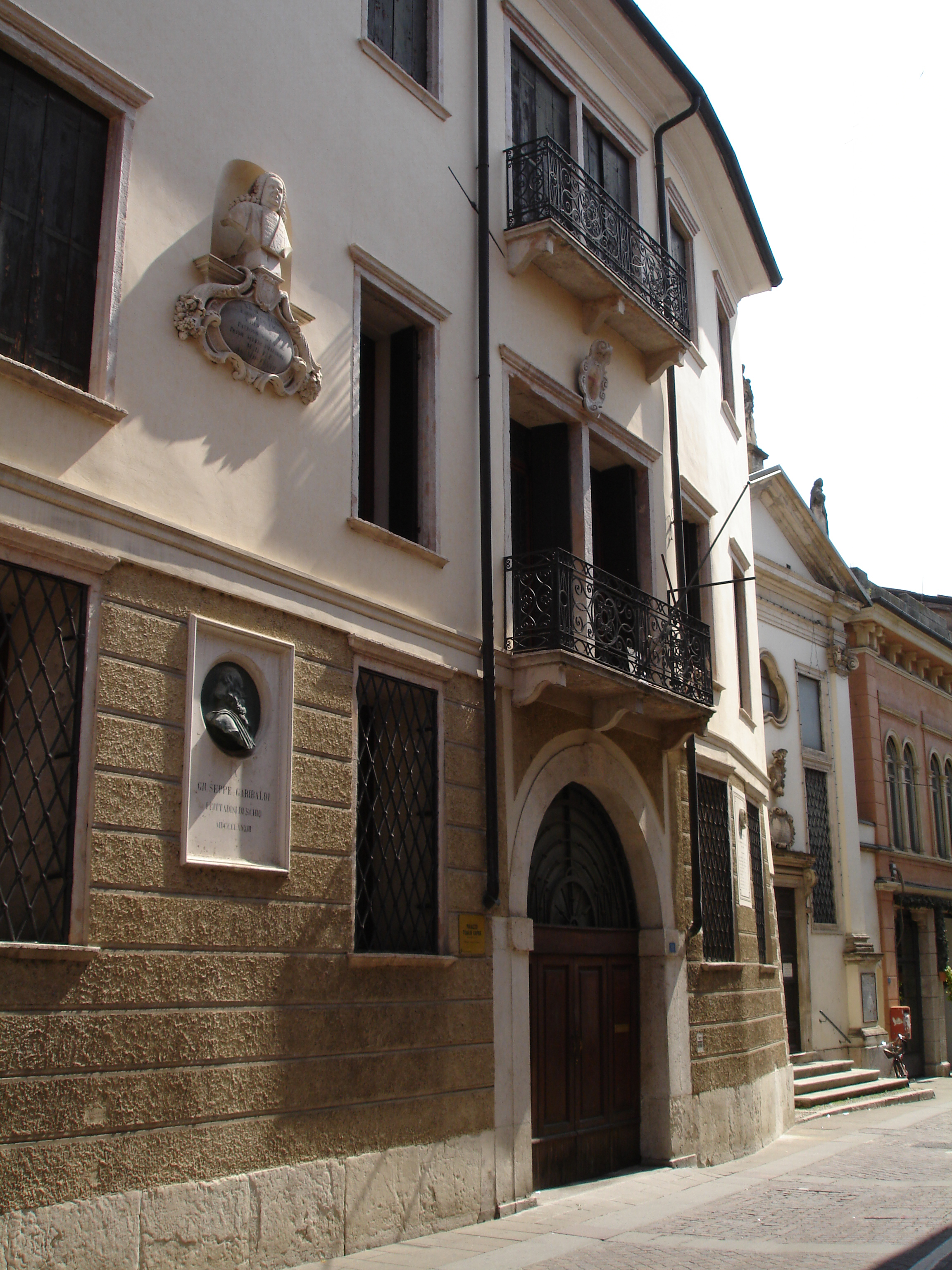 Palazzo Toaldi Capra (con Busto Giuseppe Garibaldi e Busto N. Tron sulla facciata) This is a photo of a monument which is part of cultural heritage of Italy.